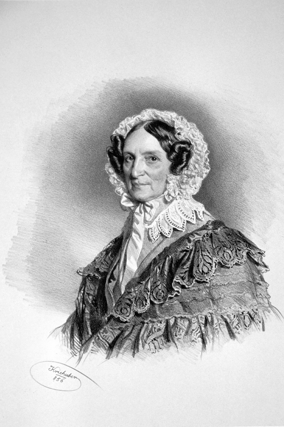 Antonie Adamberger, verehel. Arneth (1790-1867), österreichische Schauspielerin. Lithographie von Josef Kriehuber, 1856